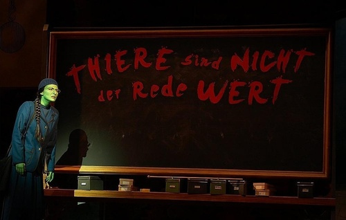 Willemijen Verkaik Classroom Scene